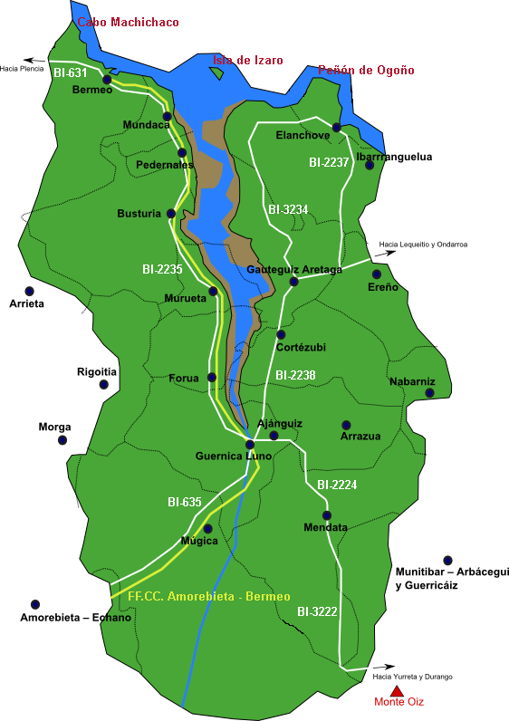 Mapa del área de Urdaibai en detalle